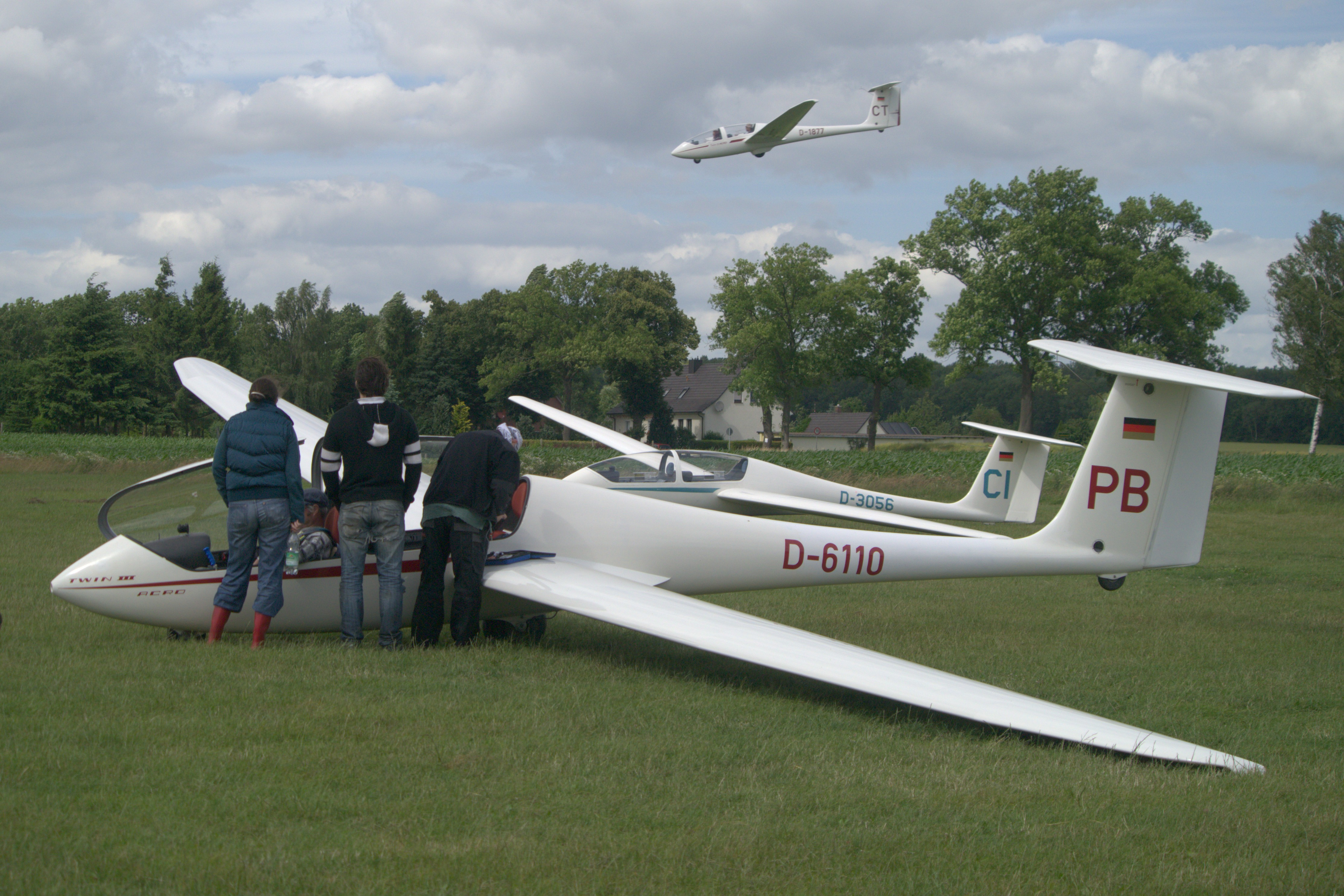 Segelflugausbildung auf dem Flugplatz Kammermark